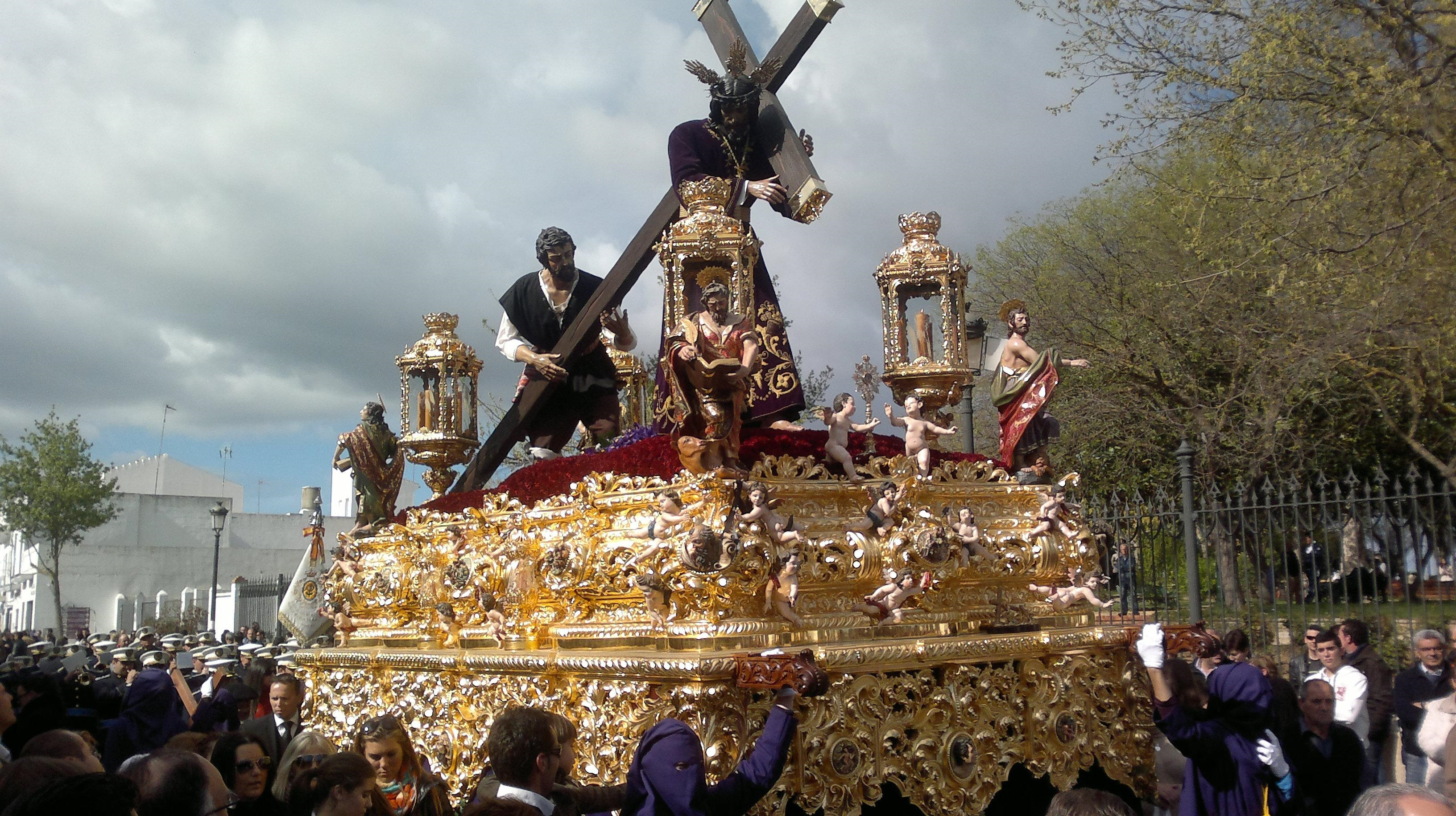 Procesión Viernes Santo madrugada. Provincia de Huelva. Hdad. de Padre Jesus.